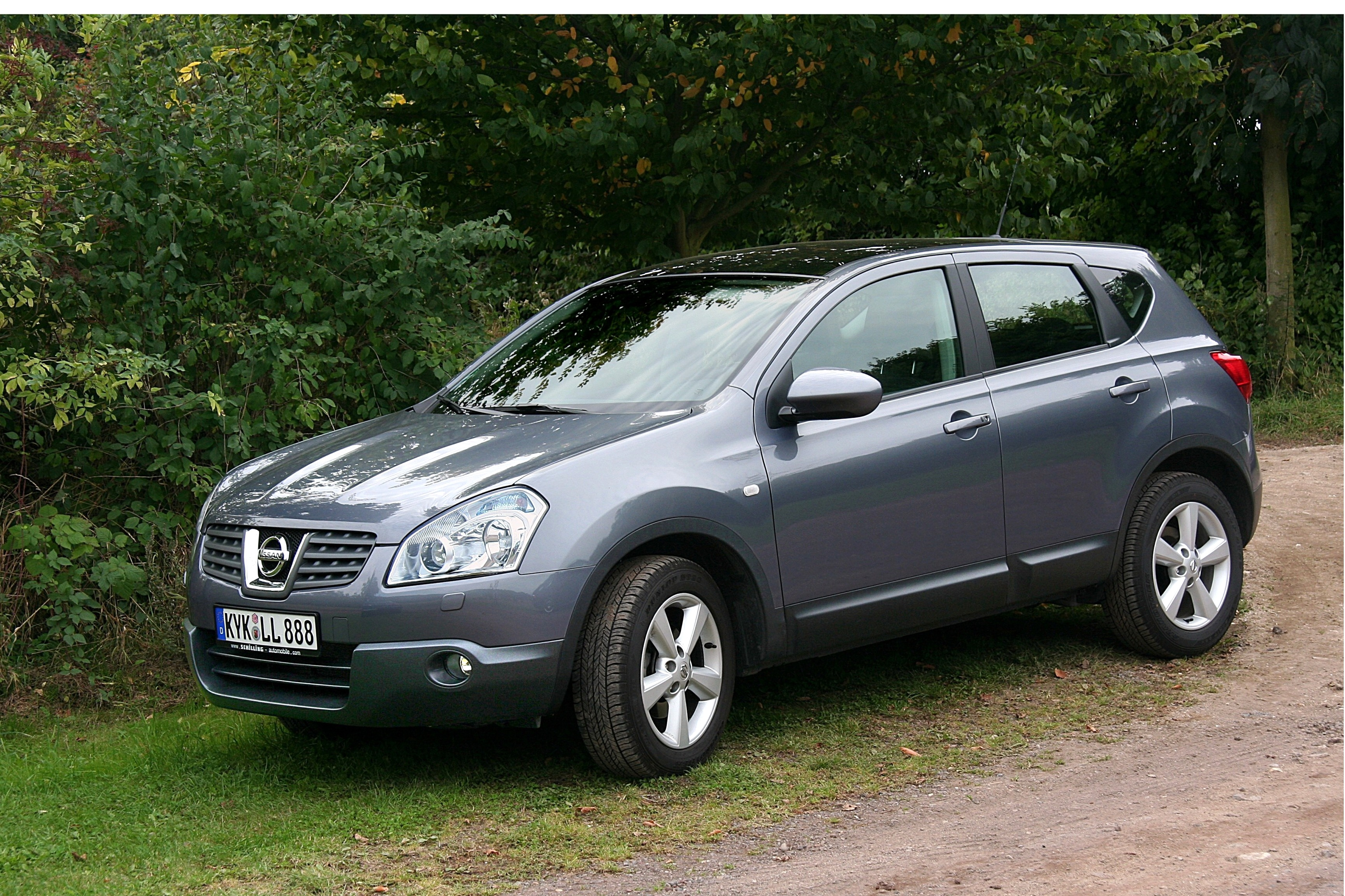 Nissan Qashqai mit Panoramaglasdach, Baujahr 2008 (Kennzeichen verändert)